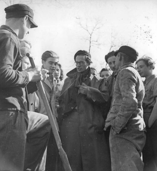 Tränke, Planung der Bauarbeiten (siehe Begleittext) Dorf Tränke erhält Licht. UBz: Der Bürgermeister von Tränke, Scheibe, bespricht mit freiwilligen Helfern den Arbeitseinsatz.